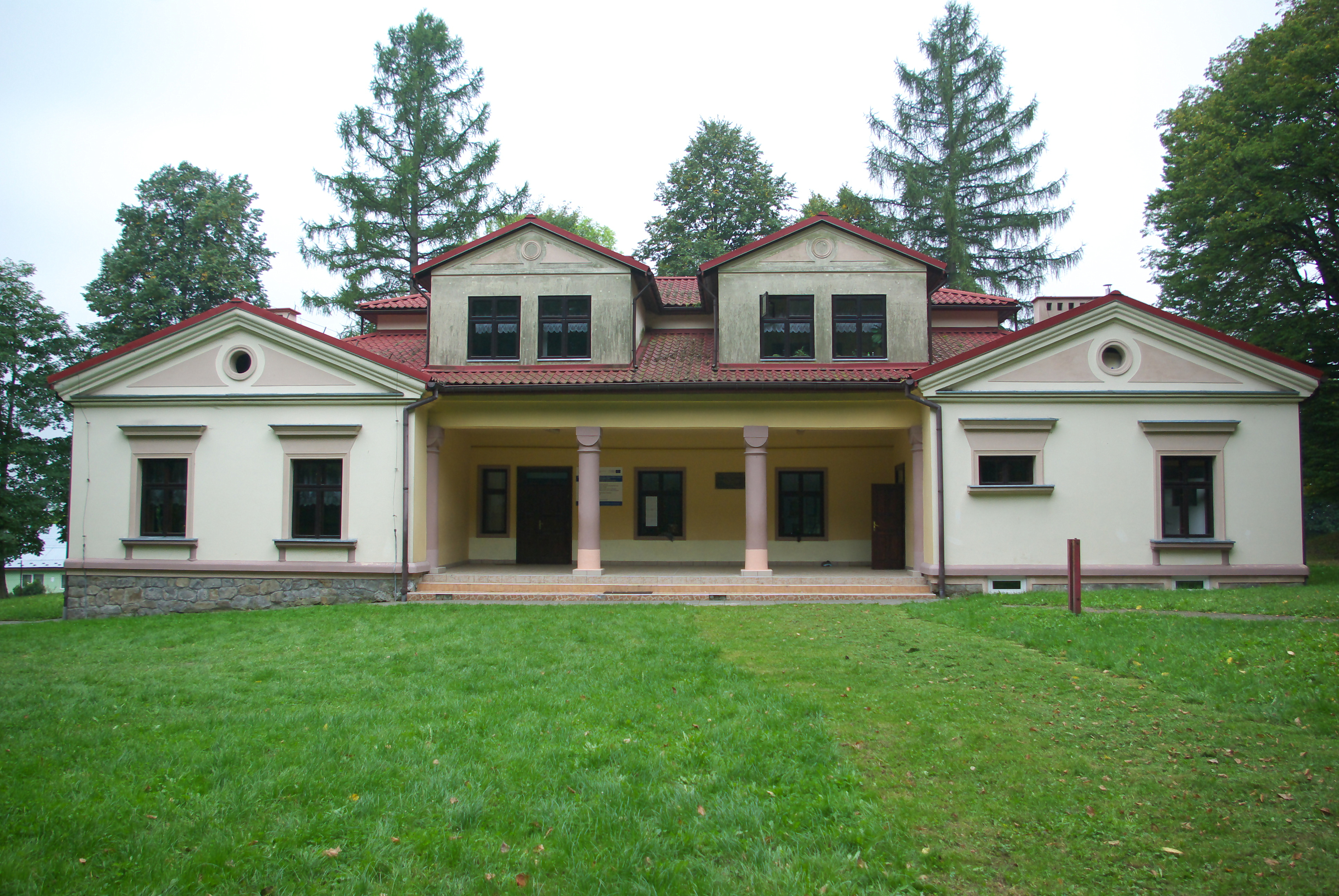 Budynek dworski w Bażanowce. Obecnie szkoła podstawowa w Bażanówce.